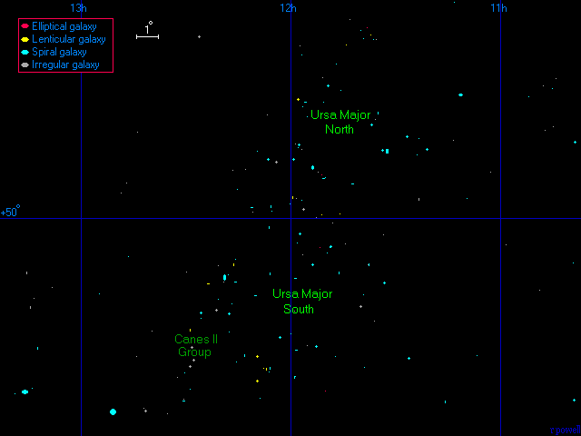 Mappa dell'Ammasso dell'Orsa Maggiore